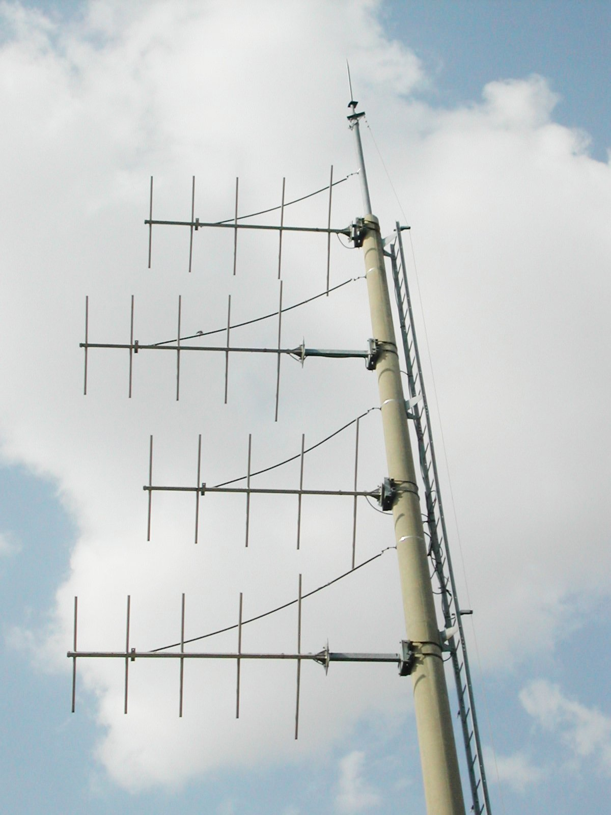 Antenne de réseau isofréquence synchrone. Prise à l'appareil numérique, sur une aire d'autoroute (près de Chartres).